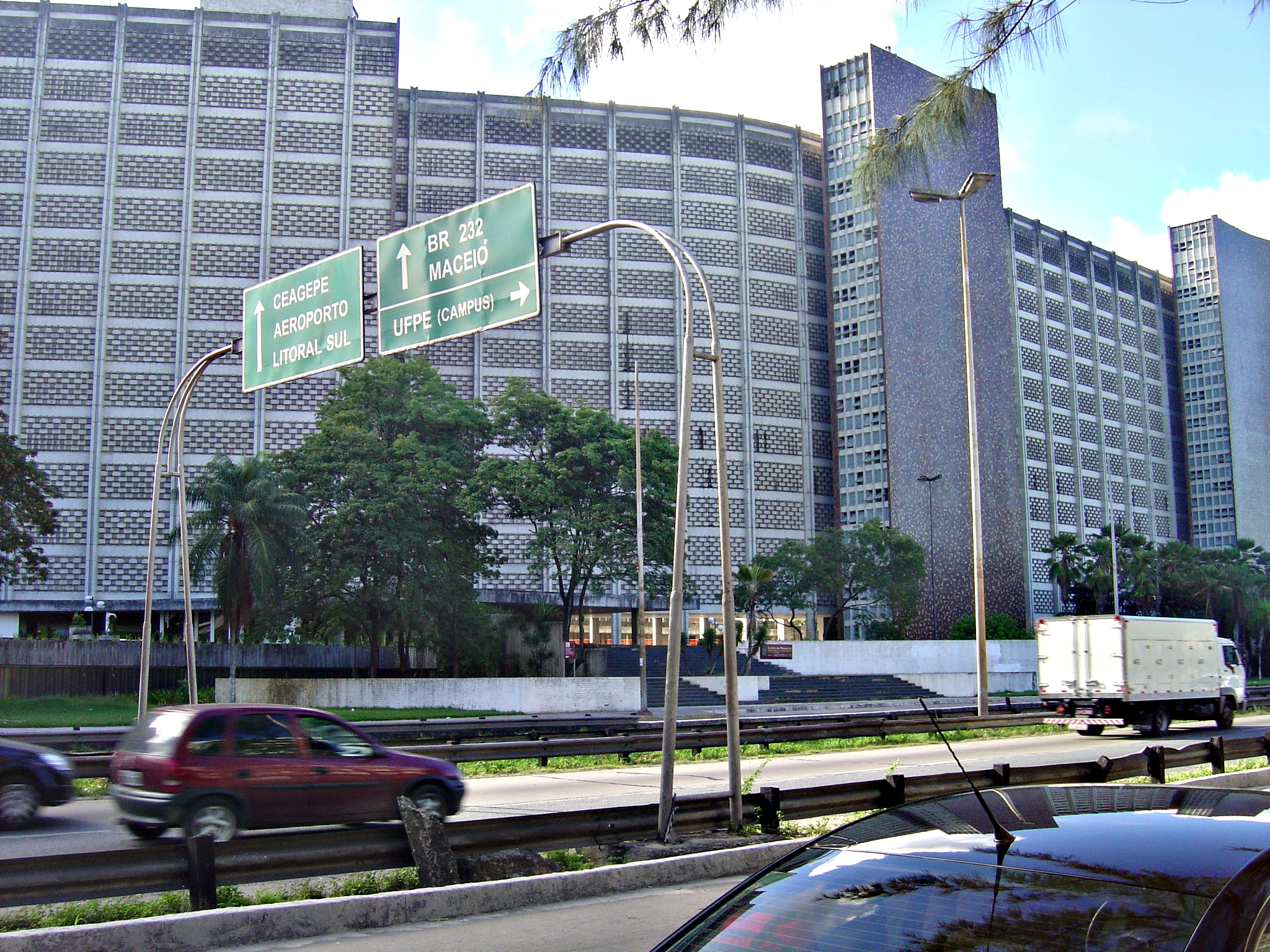 Edifício da Sudene, Cidade Universitária, Recife, Pernambuco, Brasil. Atualmente ocupado pela Justiça do Trabalho.